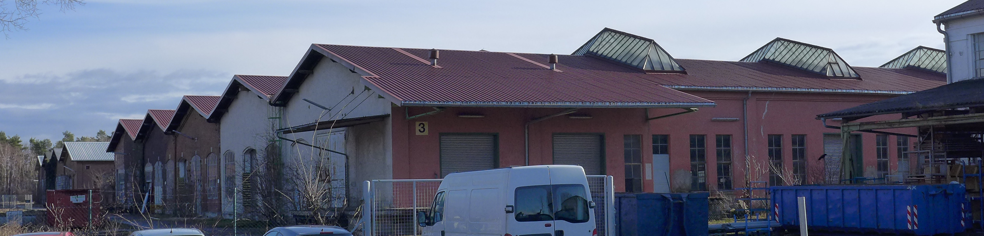 Papinstr. 53 Bau 2, München